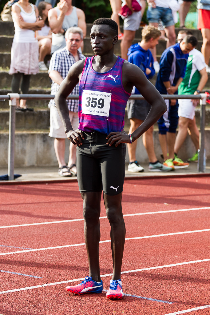 Laufgala des TSV Pfungstadt am 3. Juni 2017.